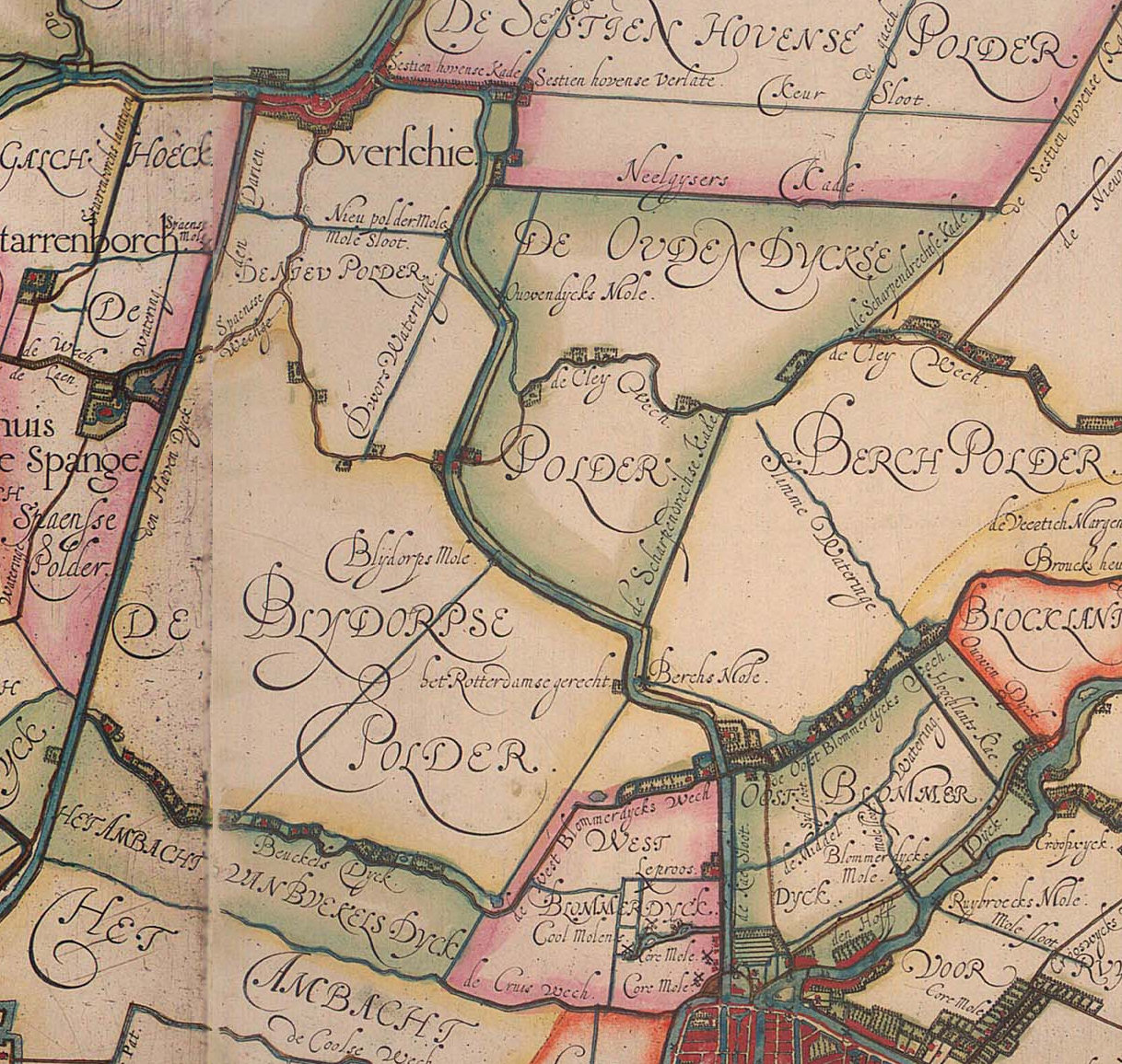 Detail uit de kaart van Schieland van 1611 van Floris Balthasarsz. van Berckenrode